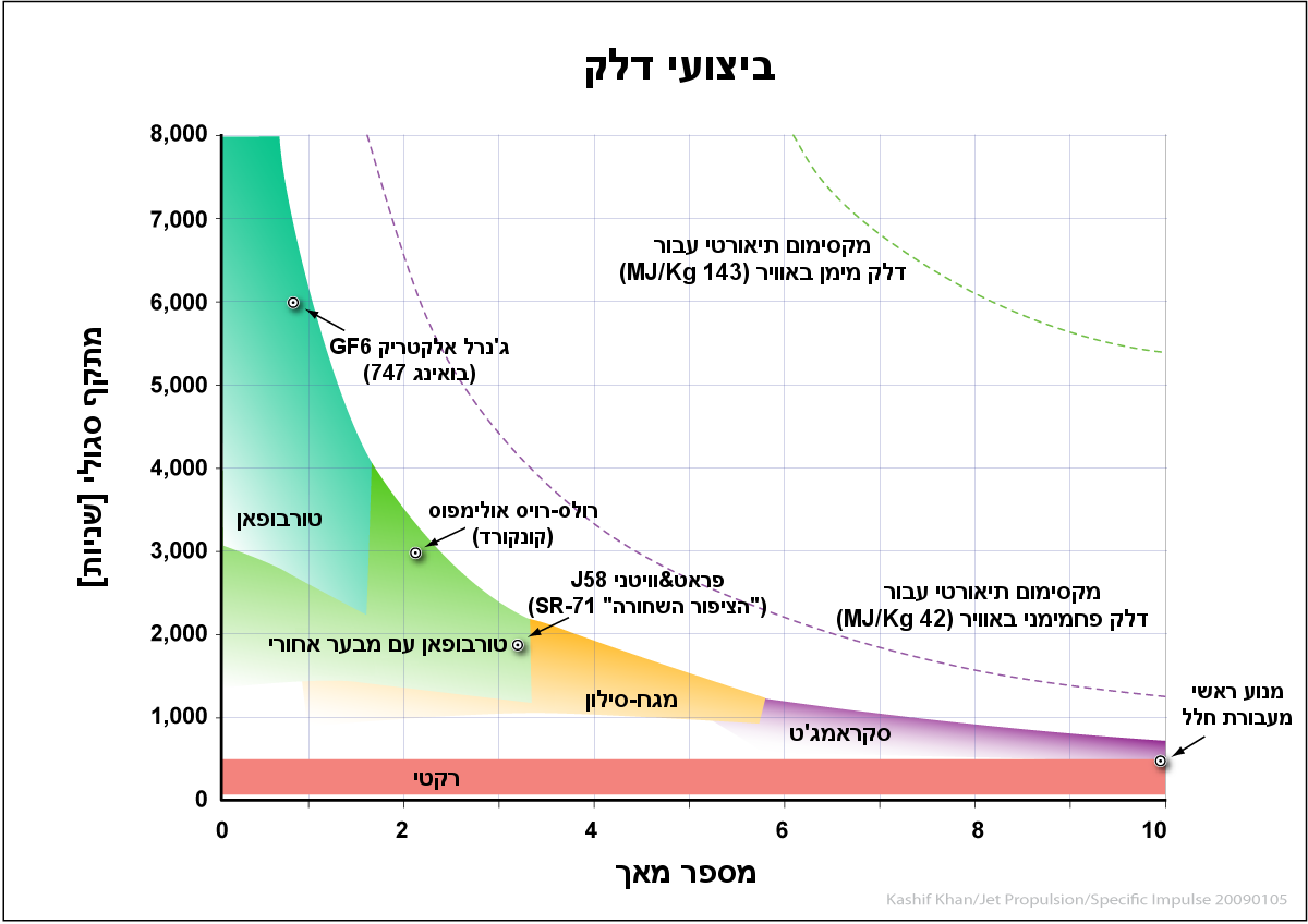 he:מתקף סגולי של סוגי מנועים שונים כתלות בhe:מספר מאך